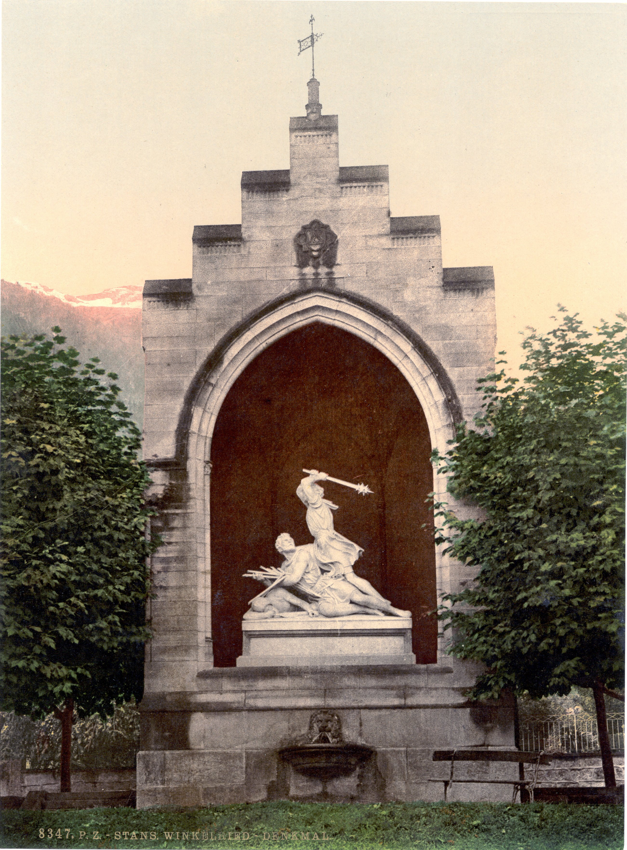 Das Winkelried-Denkmal in Stans, Unterwald um 1900